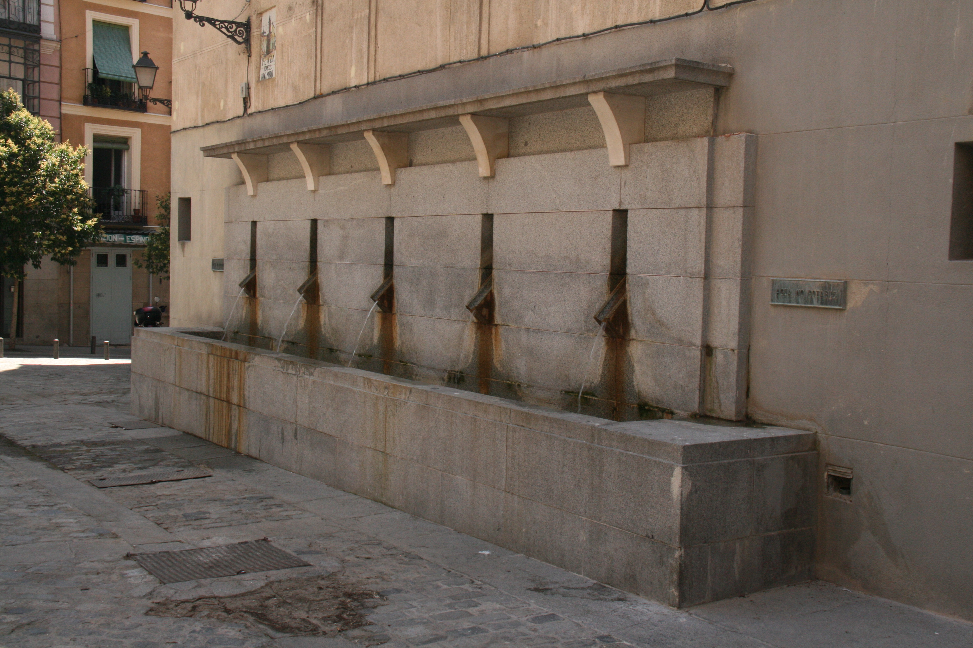 Fuente de la Plaza del Biombo, entre las calles de San Nicolás y de Calderón de la Barca, en el Madrid de los Austrias.